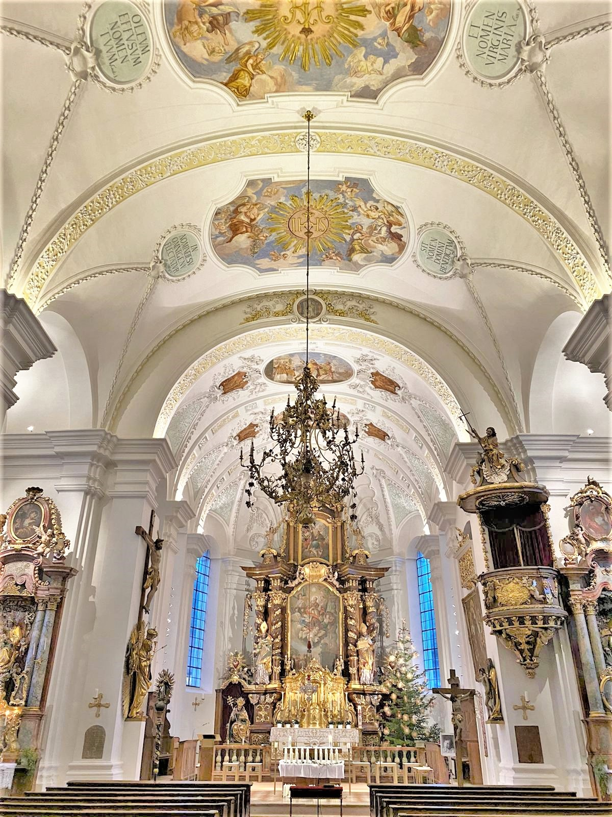 Interior of St. Sixtus (Schliersee)